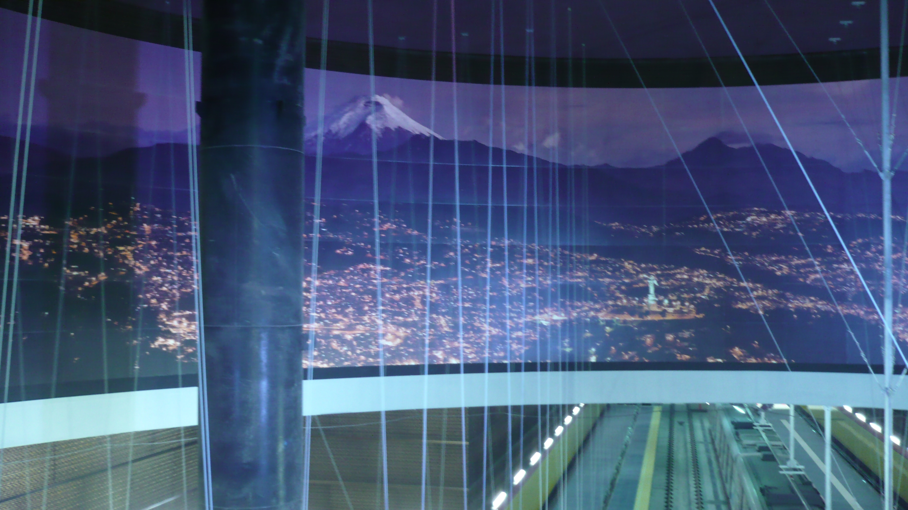 Foto del interior de la Estación Iñaquito del Metro de Quito en marzo de 2019. Es la única estación terminada a la fecha.